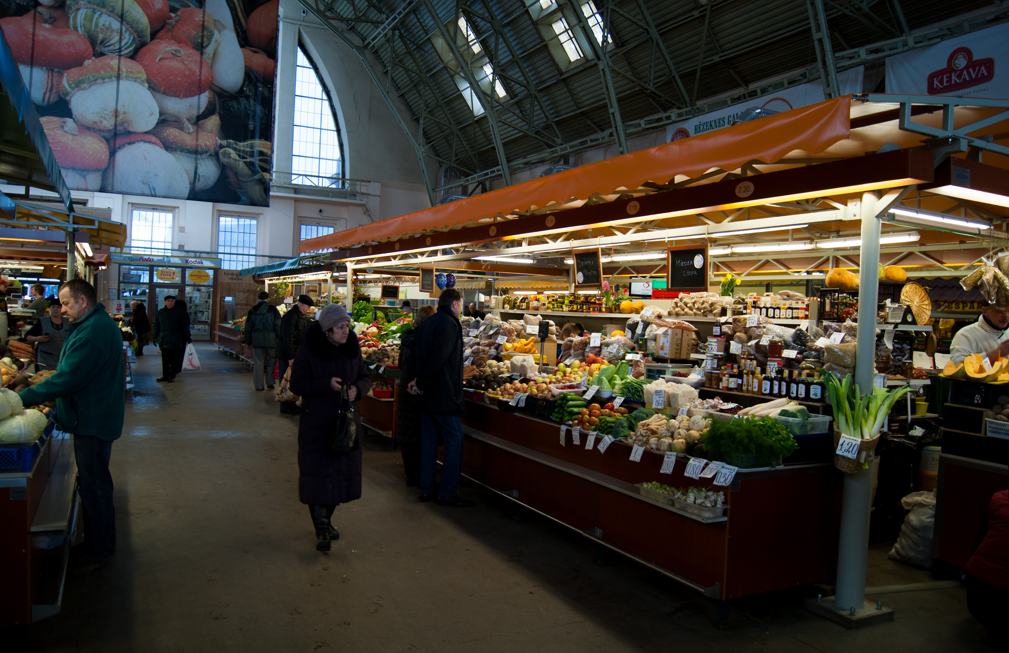 Market hall in Riga